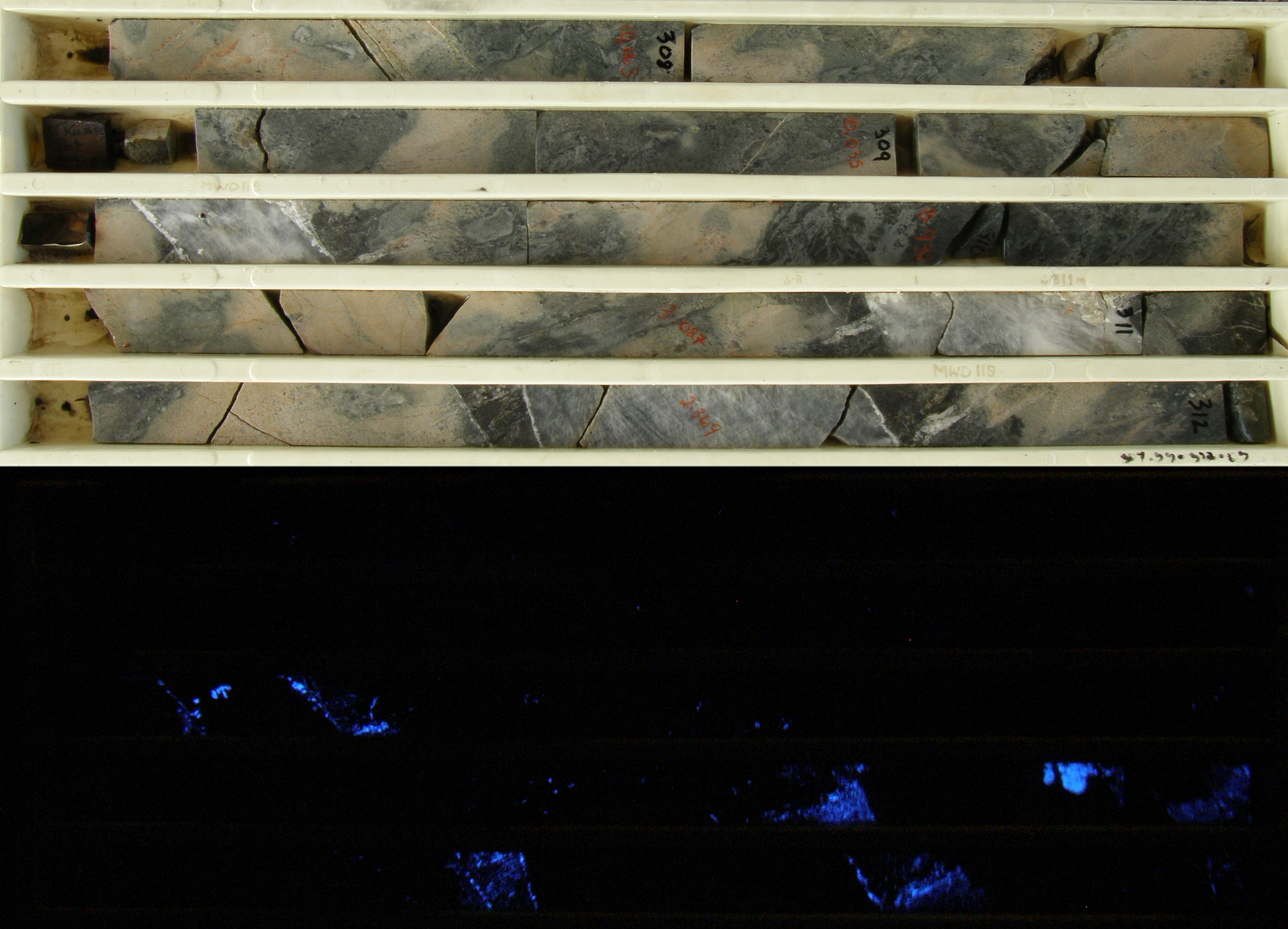 Bohrkerne mit Scheelit-fuehrenden Erz im noirmalen Lich (oben) und kurzwelligen UV-Licht (unten)